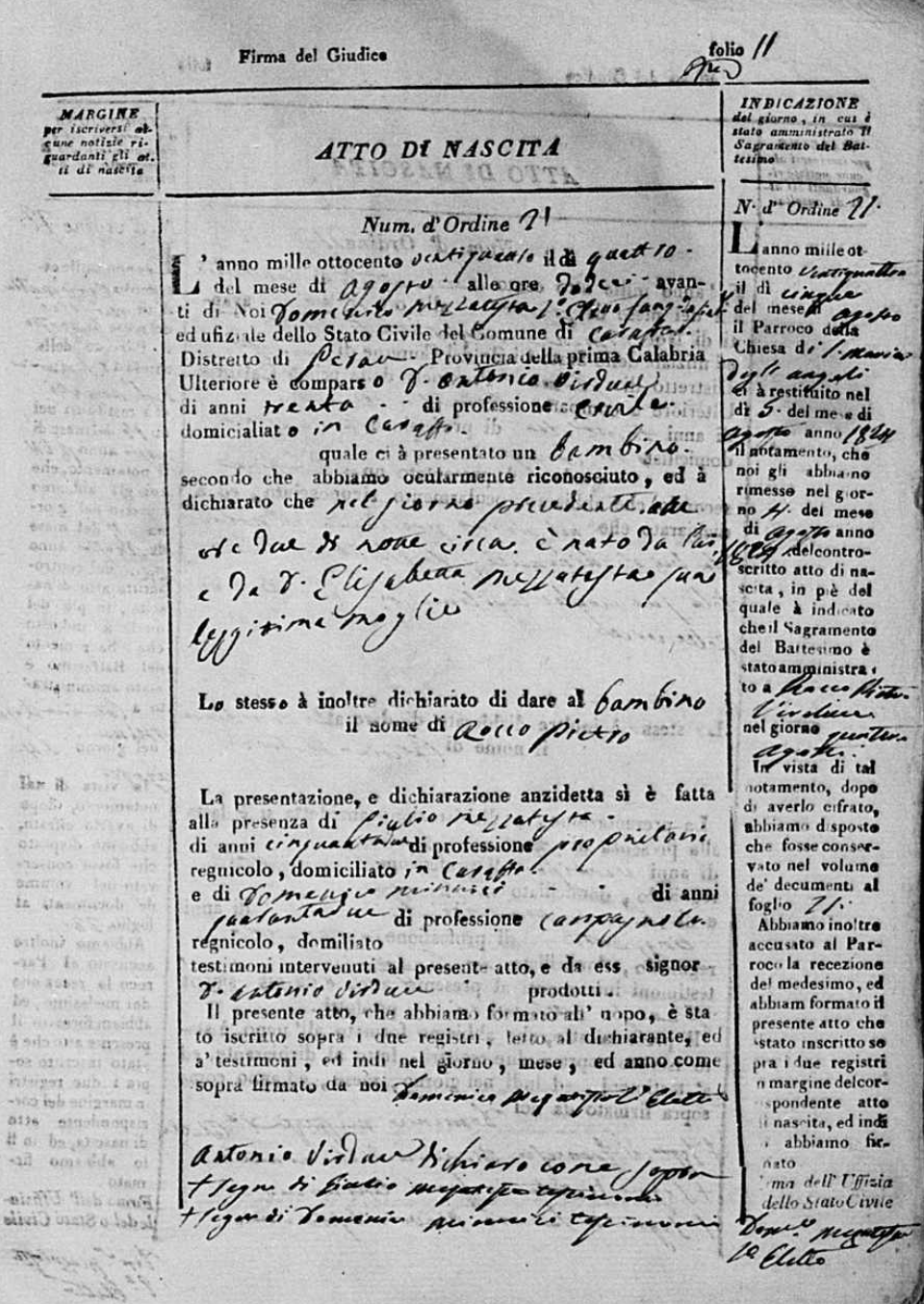 Photographie de l'acte de naissance de Rocco Verduci (datant de 1824), dans les Archives de la restauration de Caraffa del Bianco